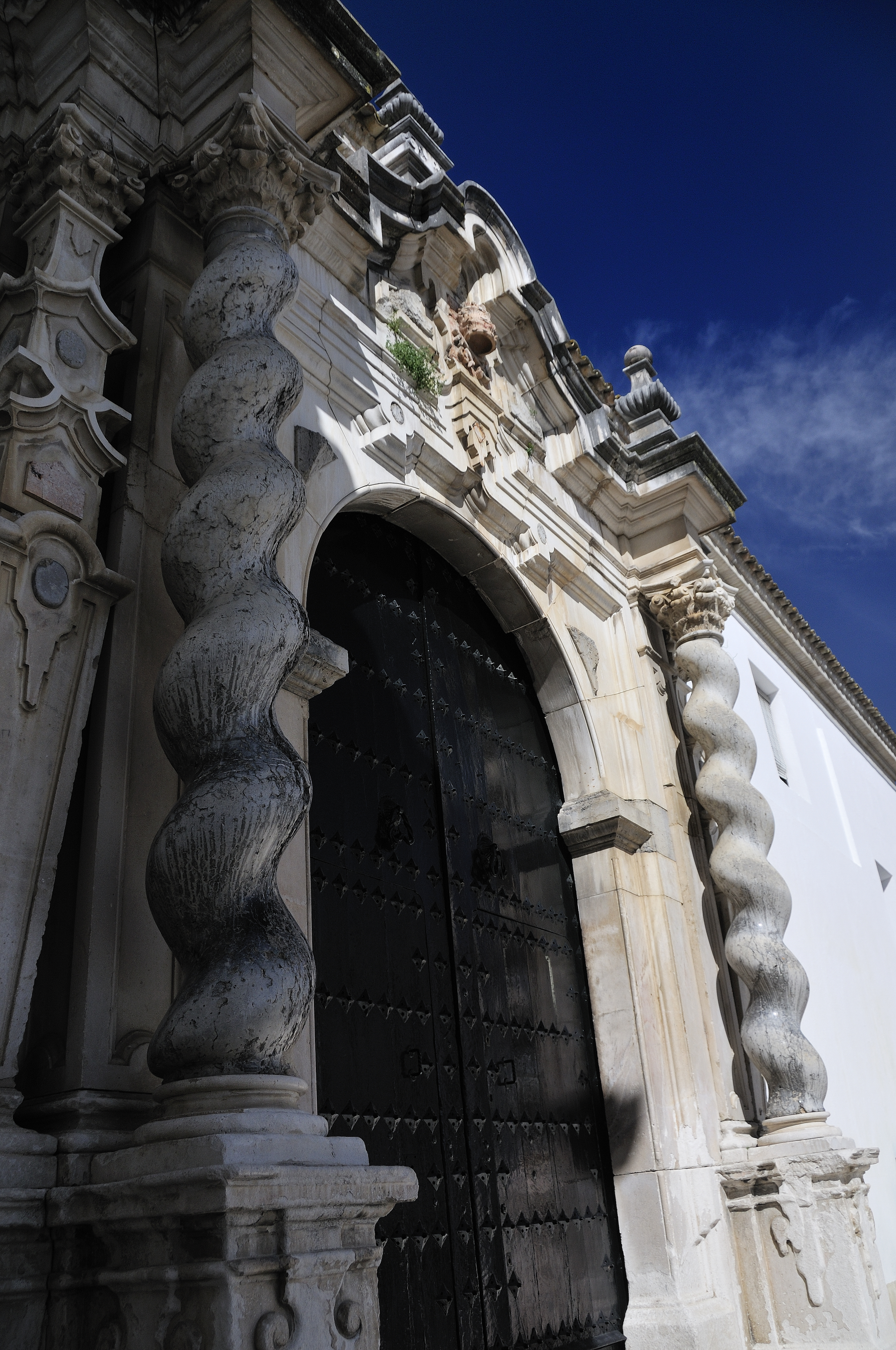 Iglesia de Ntra. Sra. de la Asunción. Cabra. Córdoba.